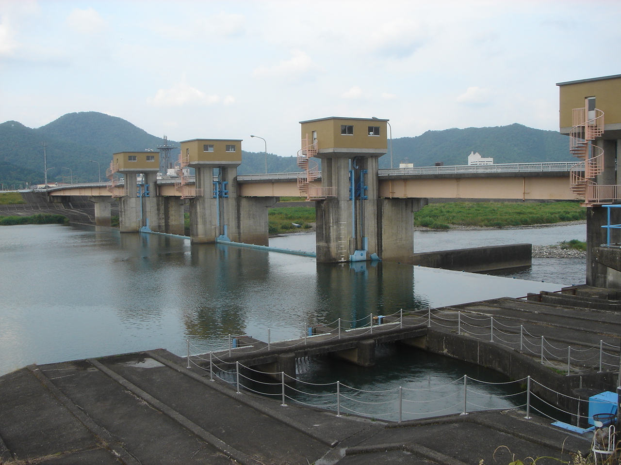 Okajima tousyukou(岡島頭首工),Ibi-rever(揖斐川),Ibigawa,Gifu,Japan(岐阜県揖斐川町)で撮影